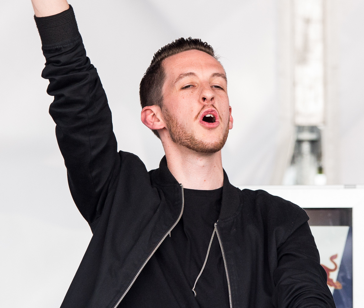 Bruce Fielder,Festival,Konzert,Livekonzert,Livemusik,Mainstage,Musik,Open Beatz 2016,Sigala